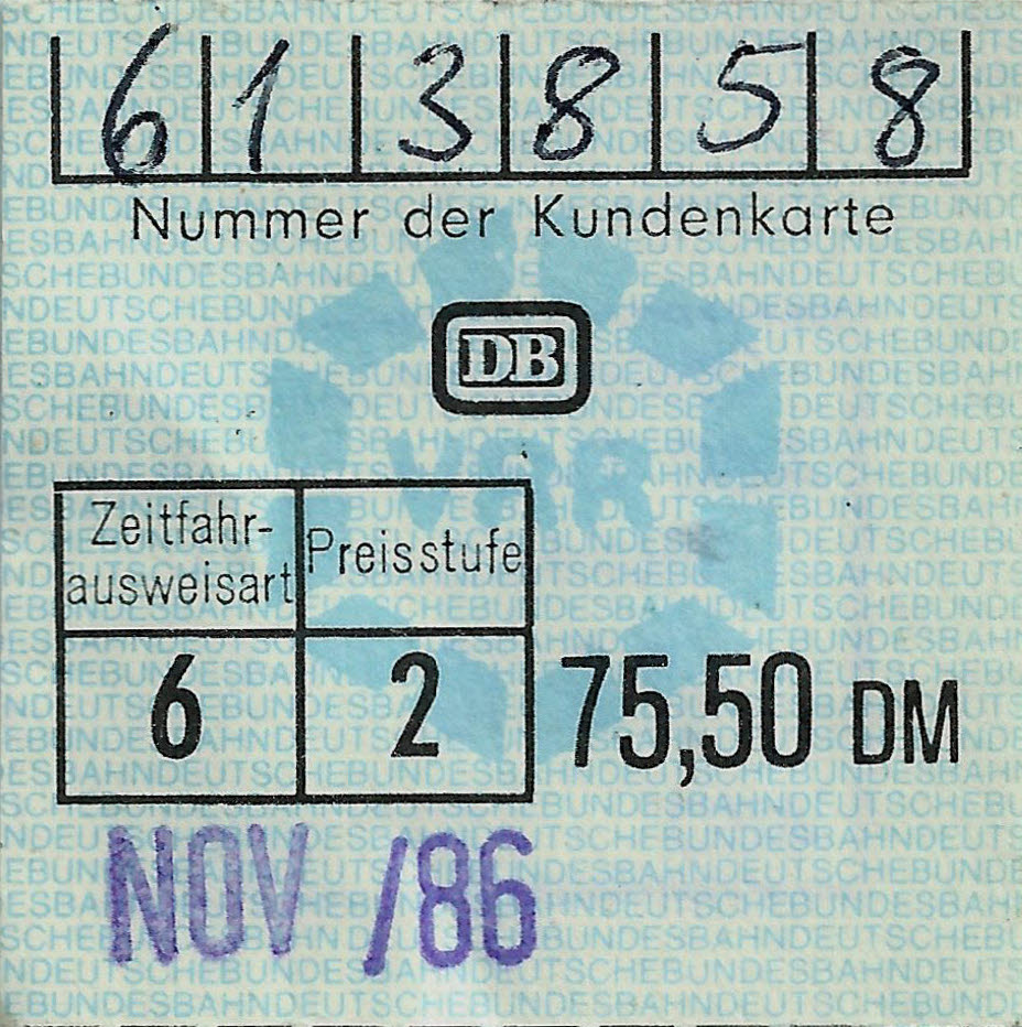 Monatskarte für den Verkehrsverbund Rhein-Ruhr (VRR), Zeitfahrausweisart 6, Preisstufe 2, ausgegeben durch die Deutsche Bundesbahn